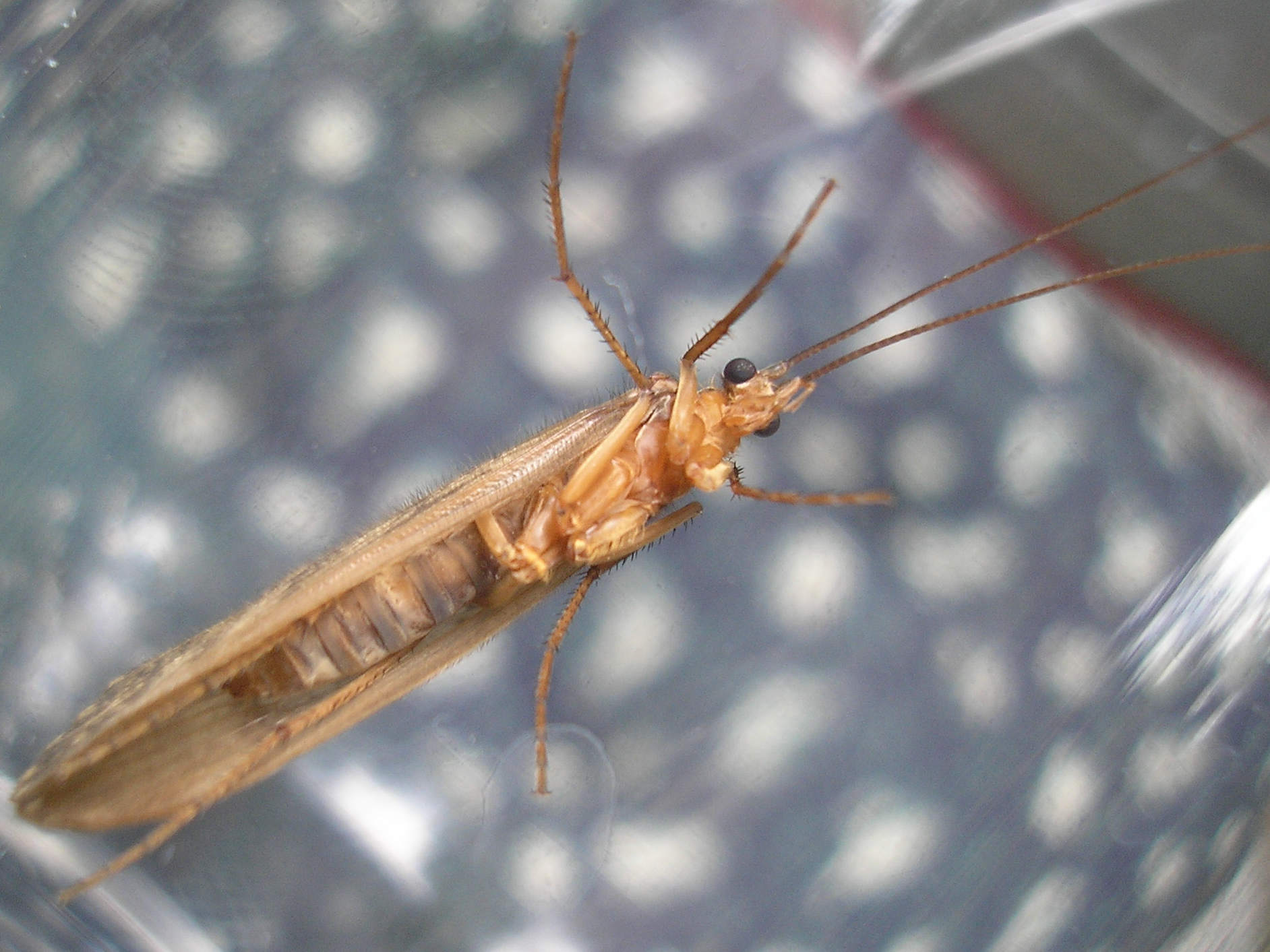 Some species of Caddisfly (Halesus cf. tesselatus) Location: Soderstorf (Lüneburger Heide), Germany Keywords: trichoptera, caddisfly --- nl: Eén of andere Schietmot Locatie: Soderstorf (Lüneburger Heide), Duitsland Trefwoorden: schietmot, kokerjuffer --- de: Irgendeine Art Köcherfliege